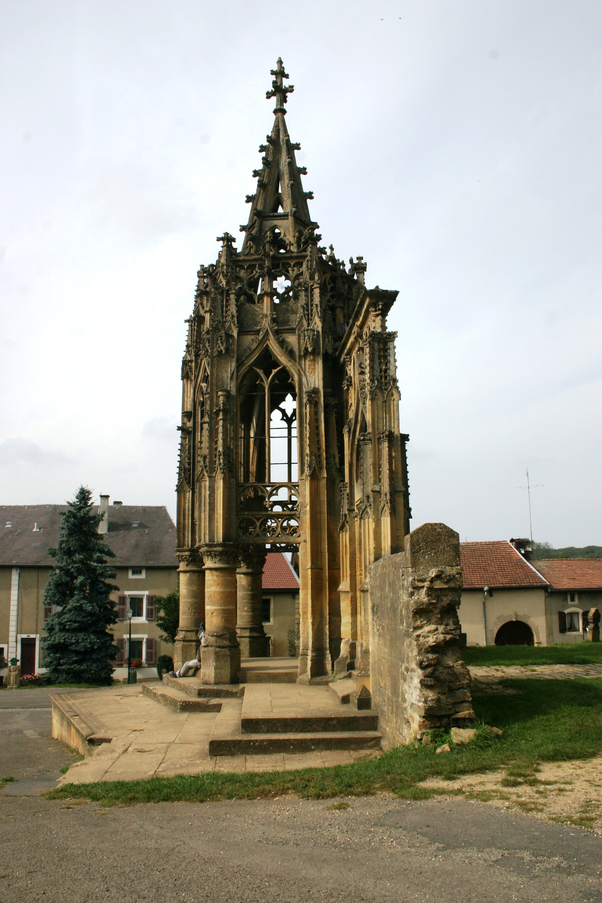 Recevresse vun Avioth.